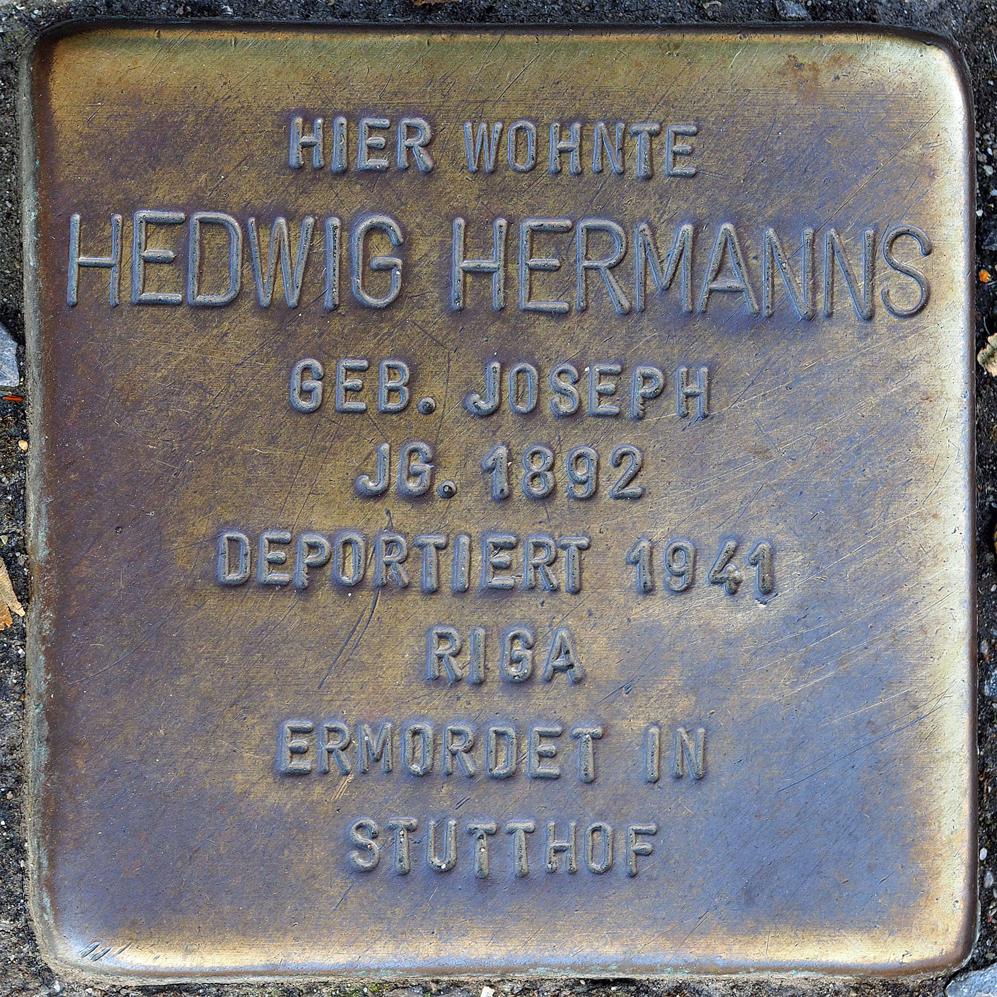 Stolpersteine MG: Hermanns, Hedwig